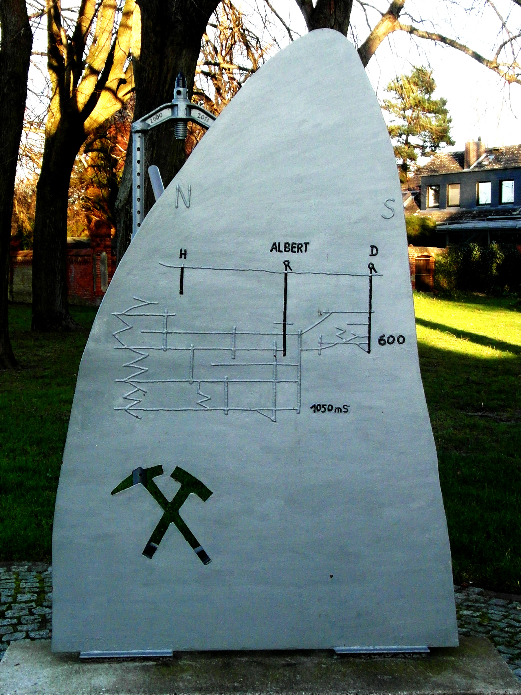 Das vom Bergmannsverein aufgestellte Denkmal neben dem ehemaligen Verwaltungsgebäude des Kaliwerk Ronnenberg zeigt eine Skizze des Grubengebäudes.